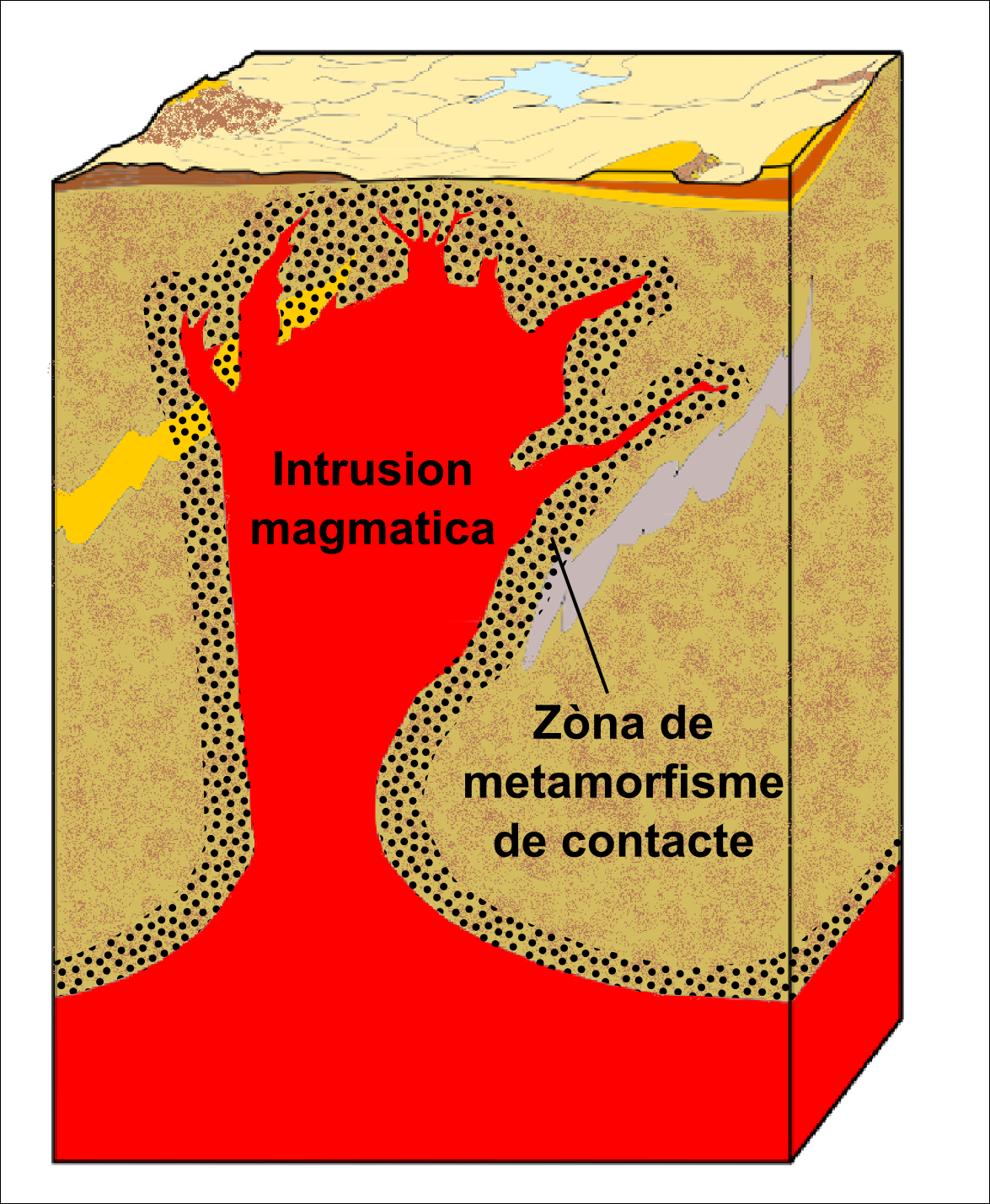 Esquèma generau dau metamorfisme de contacte.